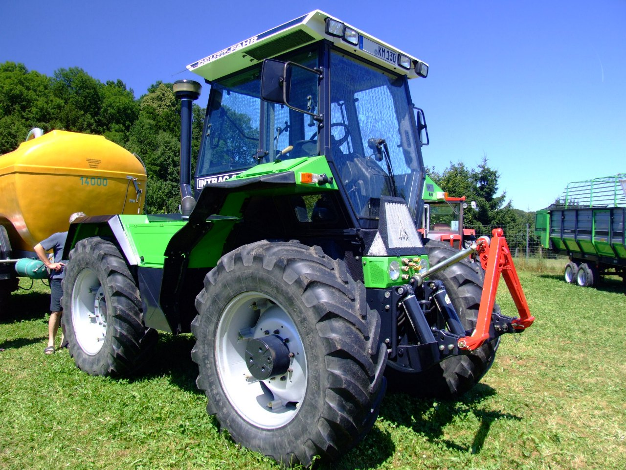 Deutz-Fahr INTRAC 6.60 mit Zunhammer-Güllefass